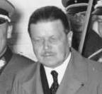 Feierliche Übergabe des vom Reichspostministerium ausgebauten Jungfliegerheims in Zeesen durch den Reichspostminister an den Korpsführer des NSFK. Beim Rundgang durch das neue Jungfliegerheim. von links: Staatssekretär General der Flieger Milch, Staatssekretär im Reichspostministerium Dipl.Ing. Nagel, Reichspostminister Dr. Ing. e.h. Ohnesorge und der Korpsführer des NSFK Generalmajor Christiansen. Photo Zoll; Scherl 7824-37